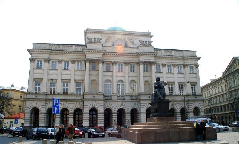 Warszawa (Polska)